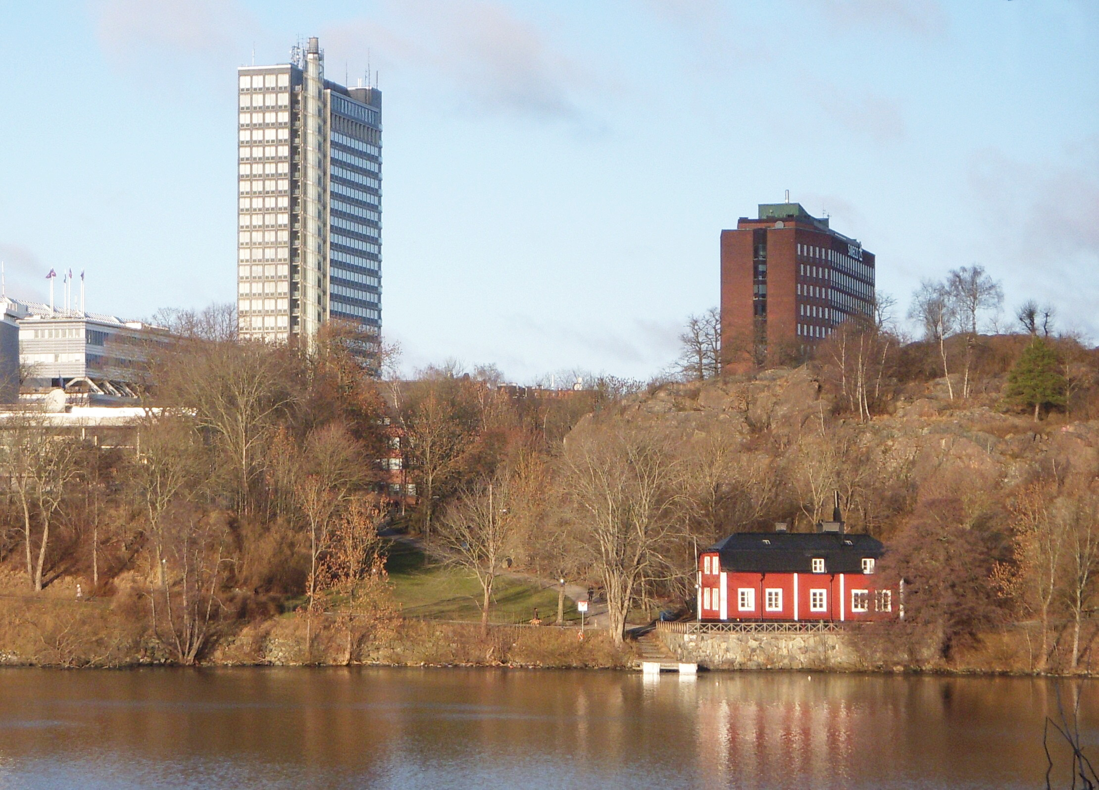 "Triewalds malmgård" på Kungsholmen i Stockholm, vy från Långholmen